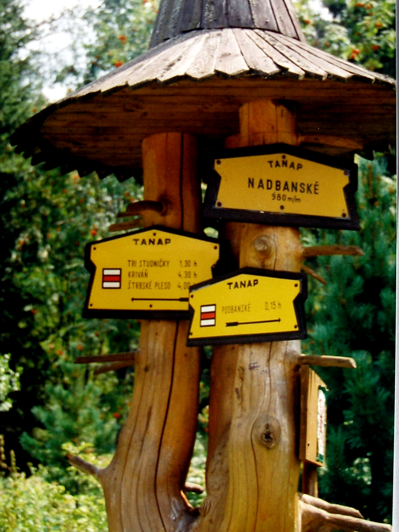 Turistický ukazovateľ.